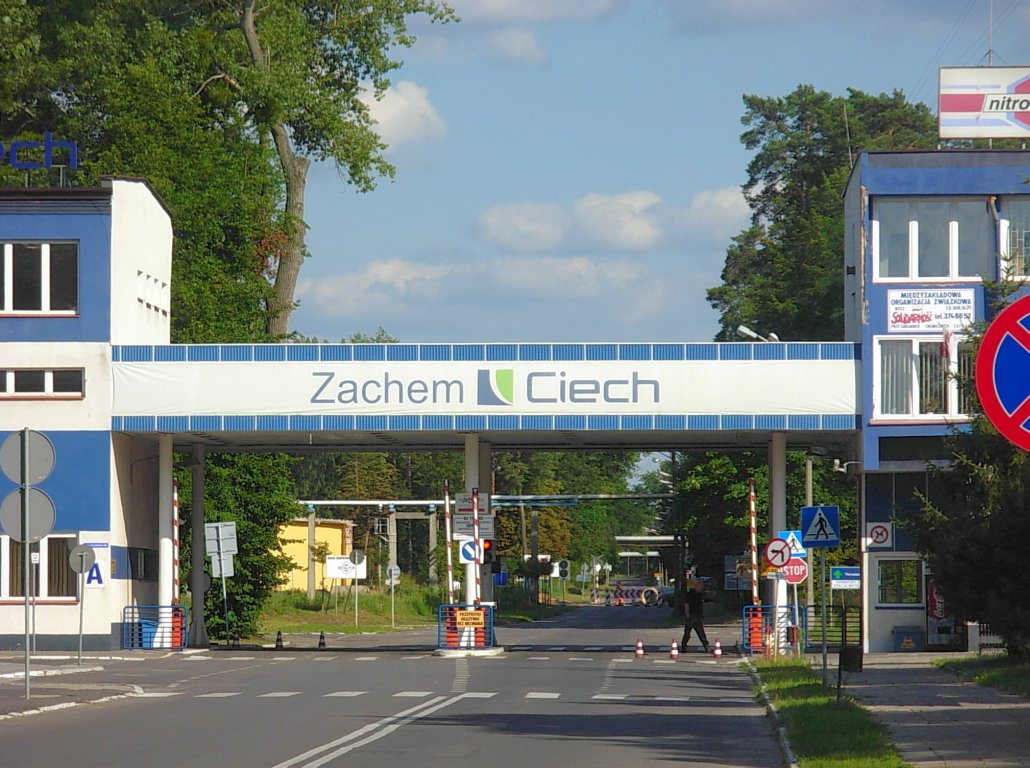 Zakłady Chemiczne Zachem w Bydgoszczy